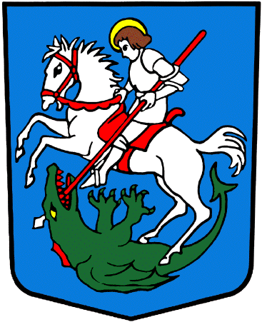 Wappen von Chermignon Kanton Wallis SCHWEIZ